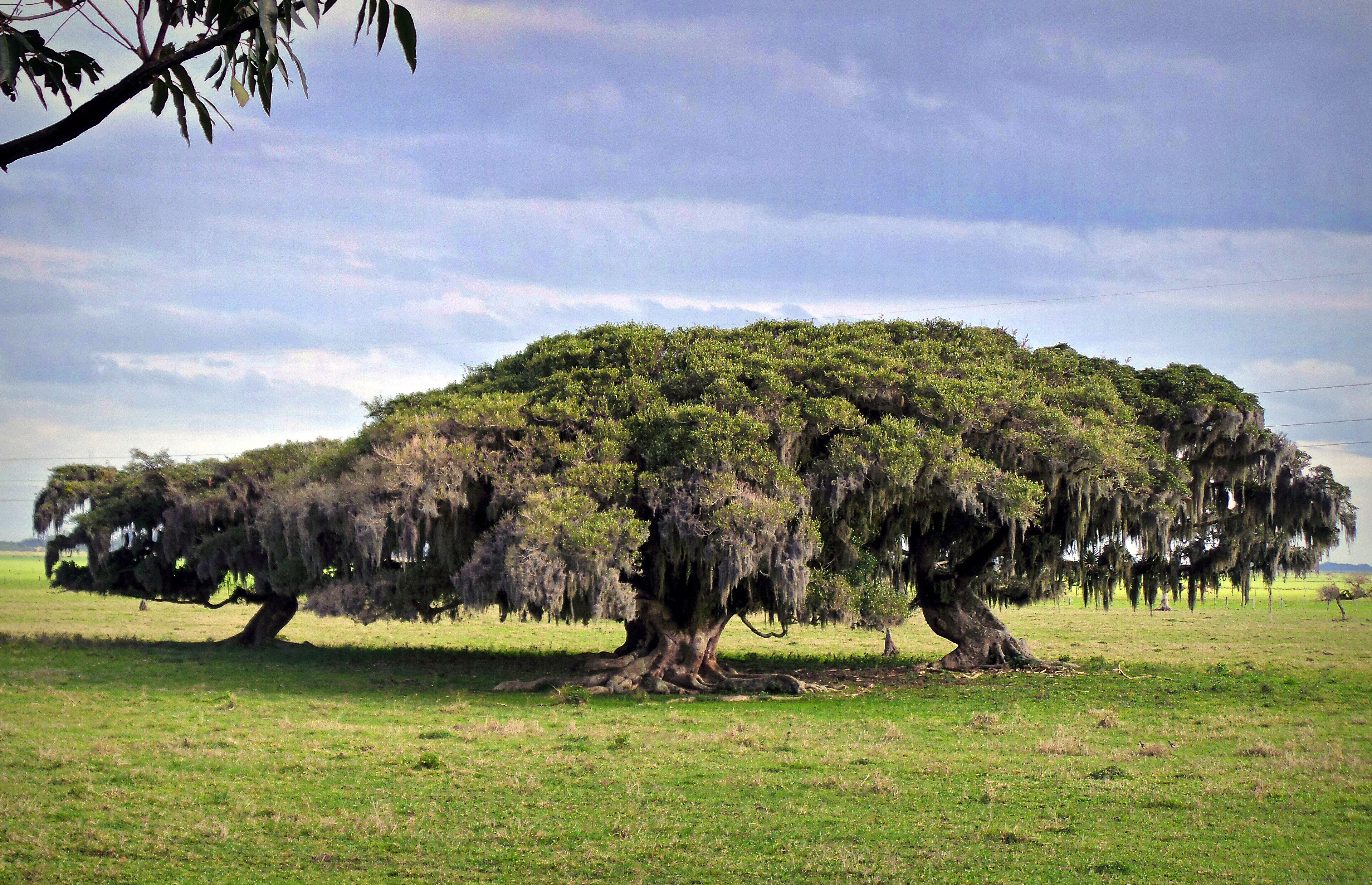 O Parque Estadual de Itapeva é uma das Unidades de Conservação do Governo do Estado do Rio Grande do Sul, Brasil. A Lagoa Itapeva é uma lagoa localizada no litoral norte do estado do Rio Grande do Sul, no Brasil.